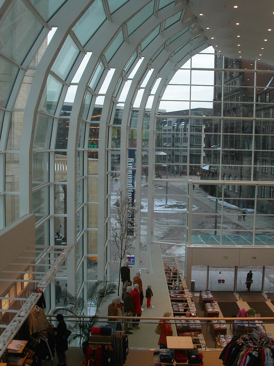 Peek und Cloppenburg Filiale Chemnitz